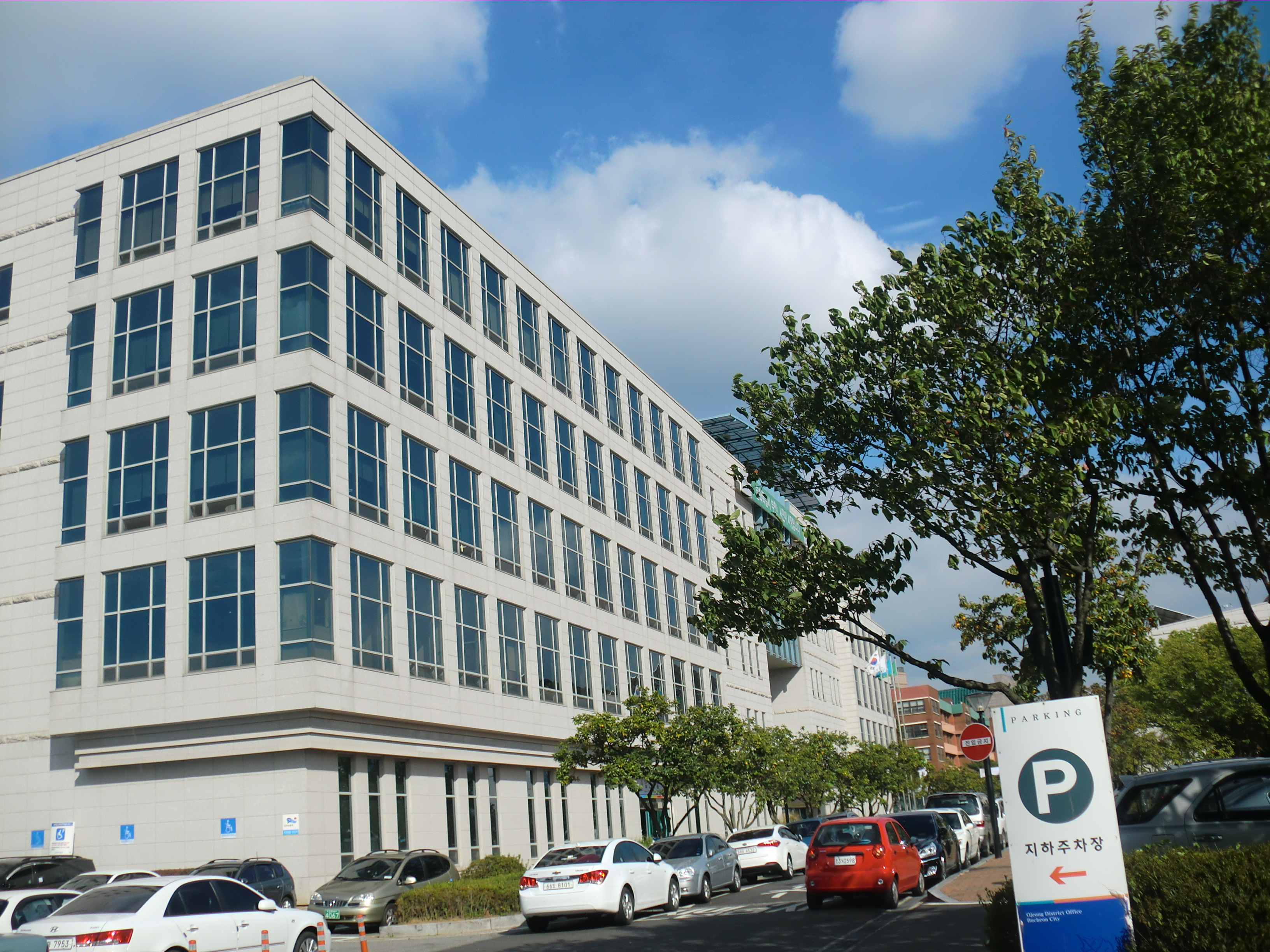 경기도 부천시에 있는 오정구청